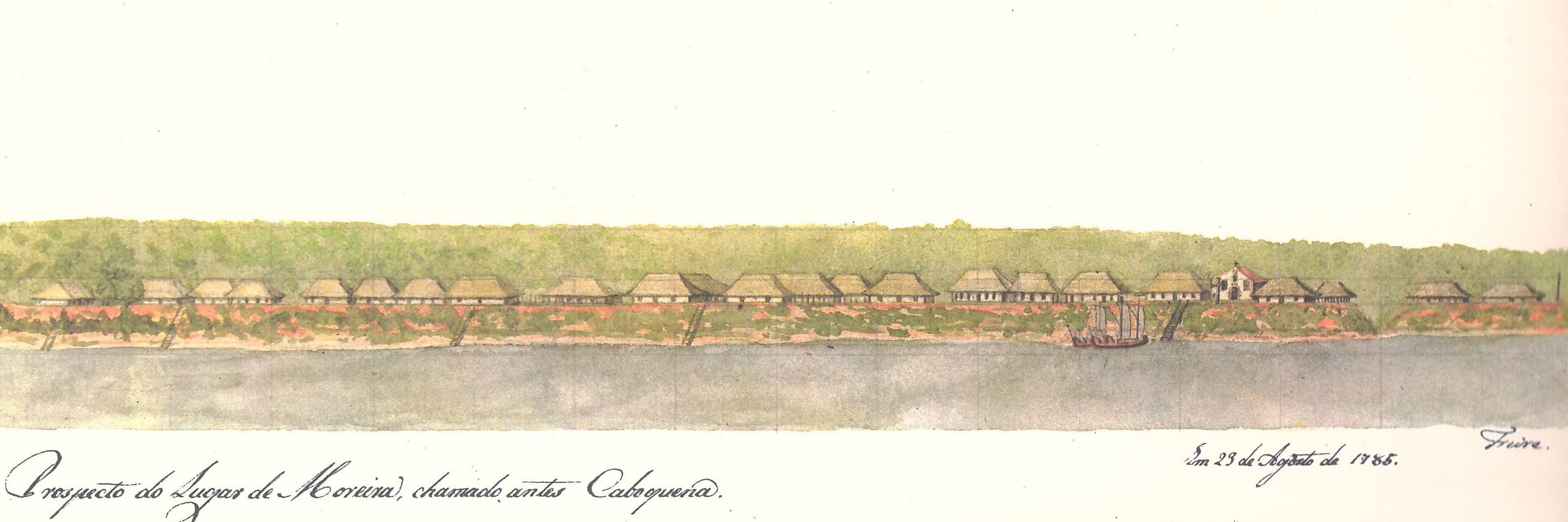 Ilustração em Viagem Filosófica pelas capitanias do Grão Pará, Rio Negro, Mato Grosso e Cuiabá.